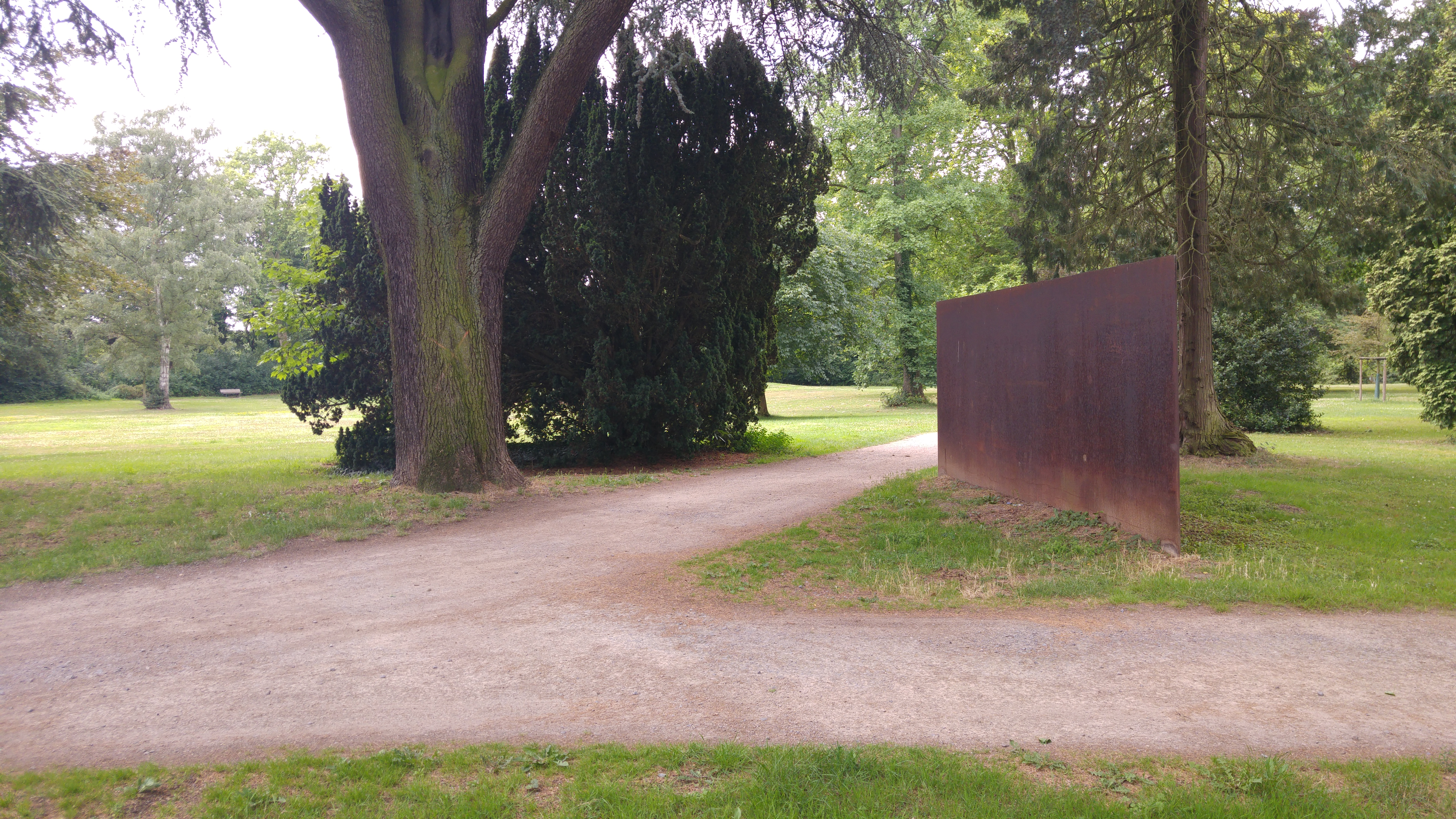 Lantz’scher Park: Skulptur (ohne Titel) von Michael Gitlin, ca. 1975, Cortenstahl